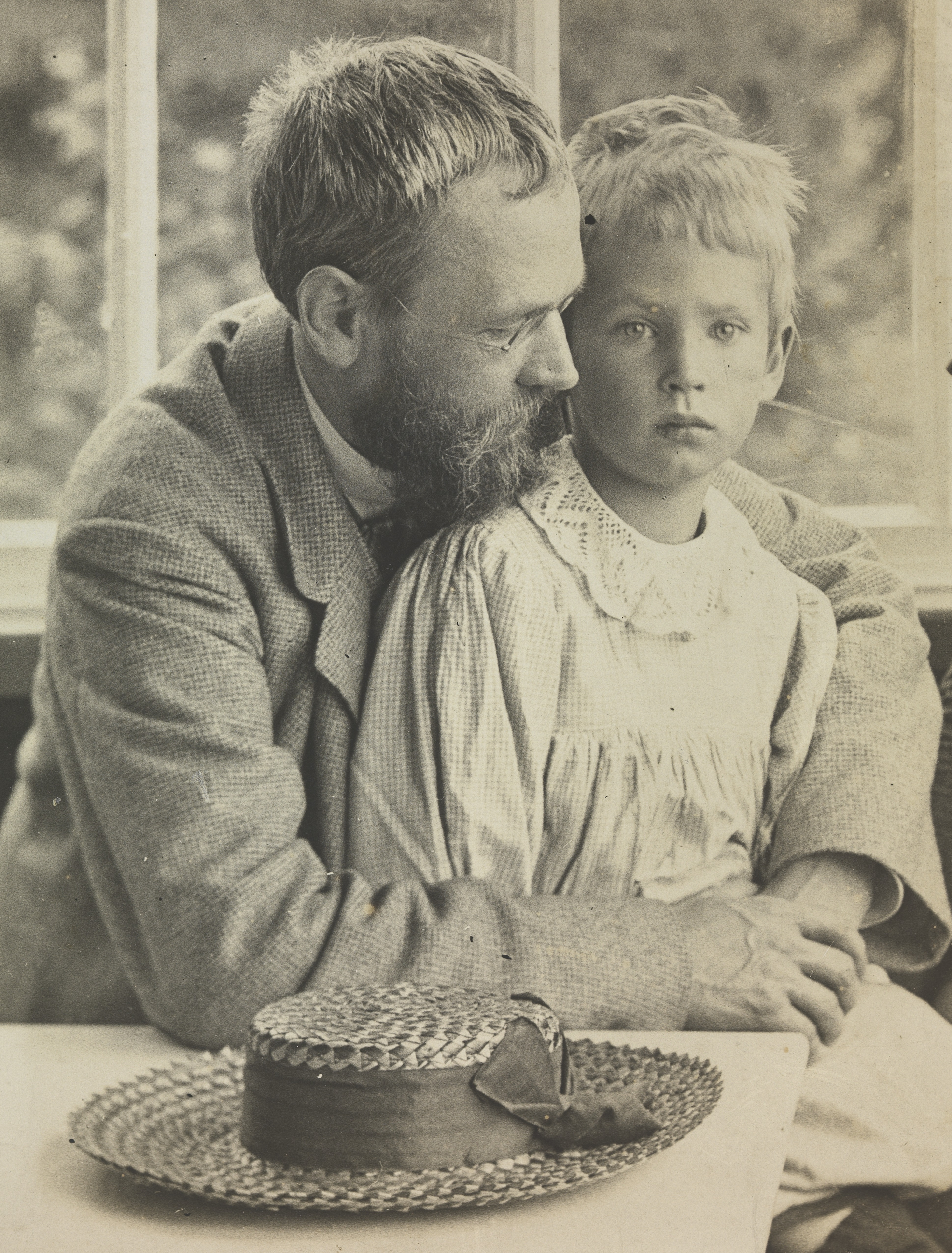 Erik Werenskiold maler med sin sønn Dagfinn på armen. Depicted person: Werenskiold, Erik (1855-1938) Depicted person: Werenskiold, Dagfinn Depicted place: Akershus, Bærum